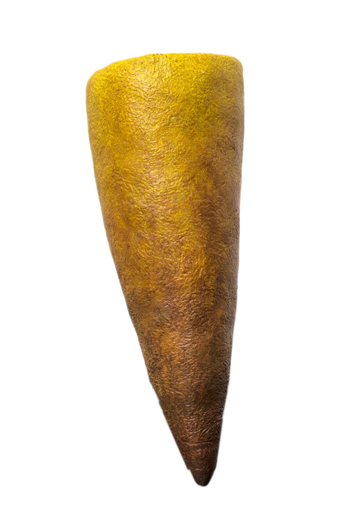 Ricostruzione in scala 1:1.